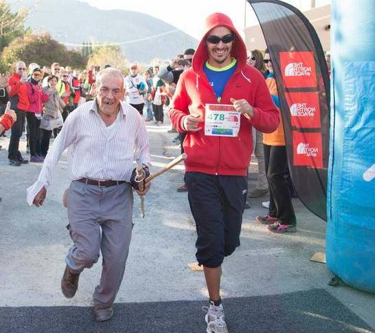 Super Paco a su llegada a meta en la maratón Falco Trail de 2013.